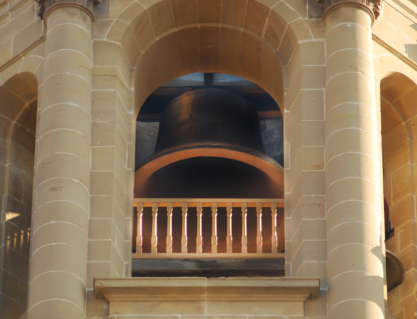 Campana María de la catedral de Pamplona. Mayor campana en uso de España.